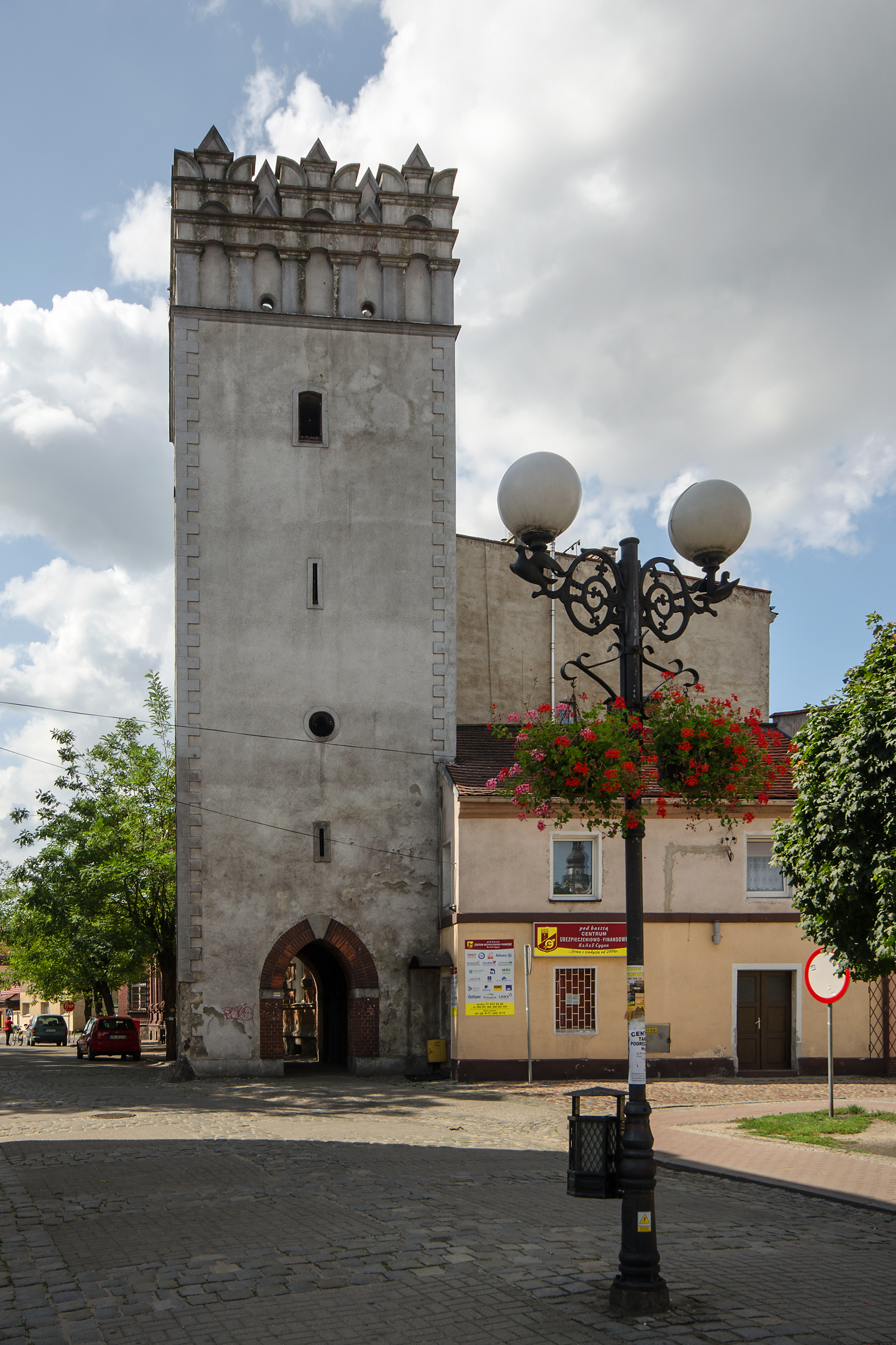 Grodków, Brama Ziębicka, XIV, XVI